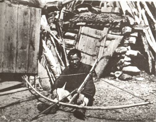 Хант з самострілом